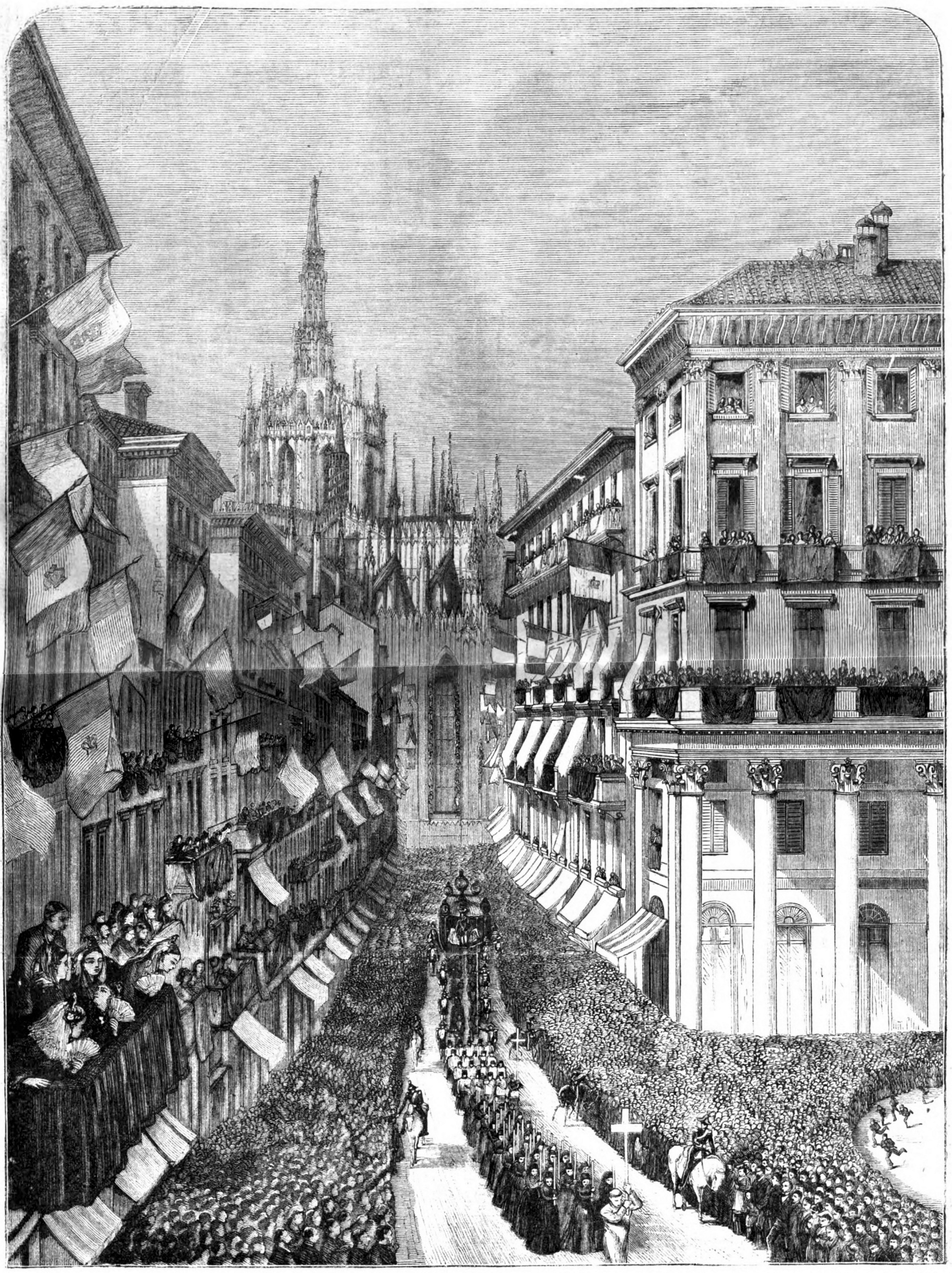 Funerali